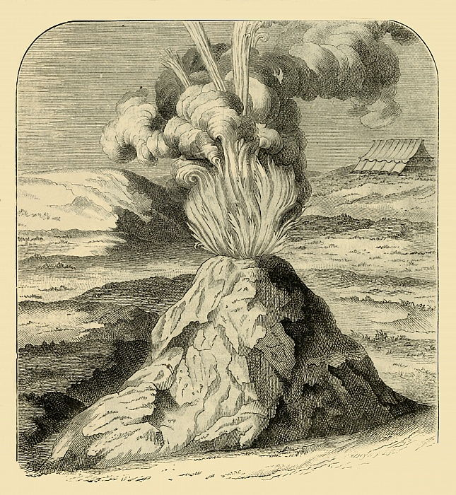 Explosión del volcán Cotopaxi en 1743